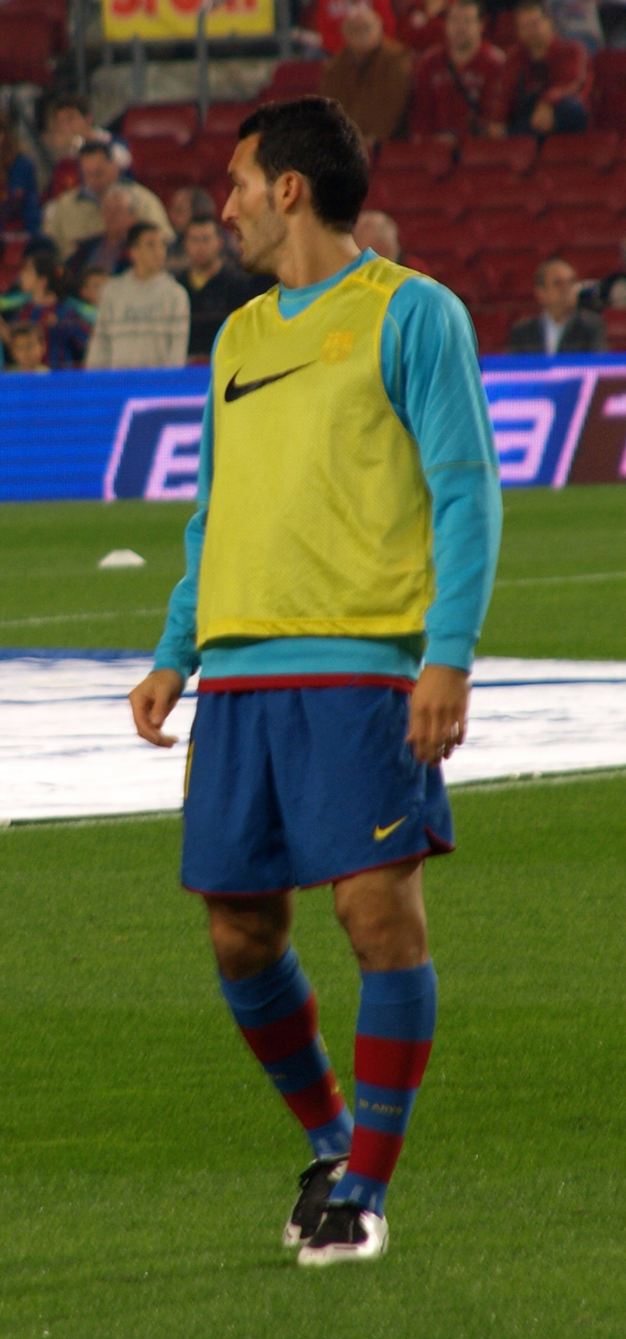 Gianluca Zambrotta